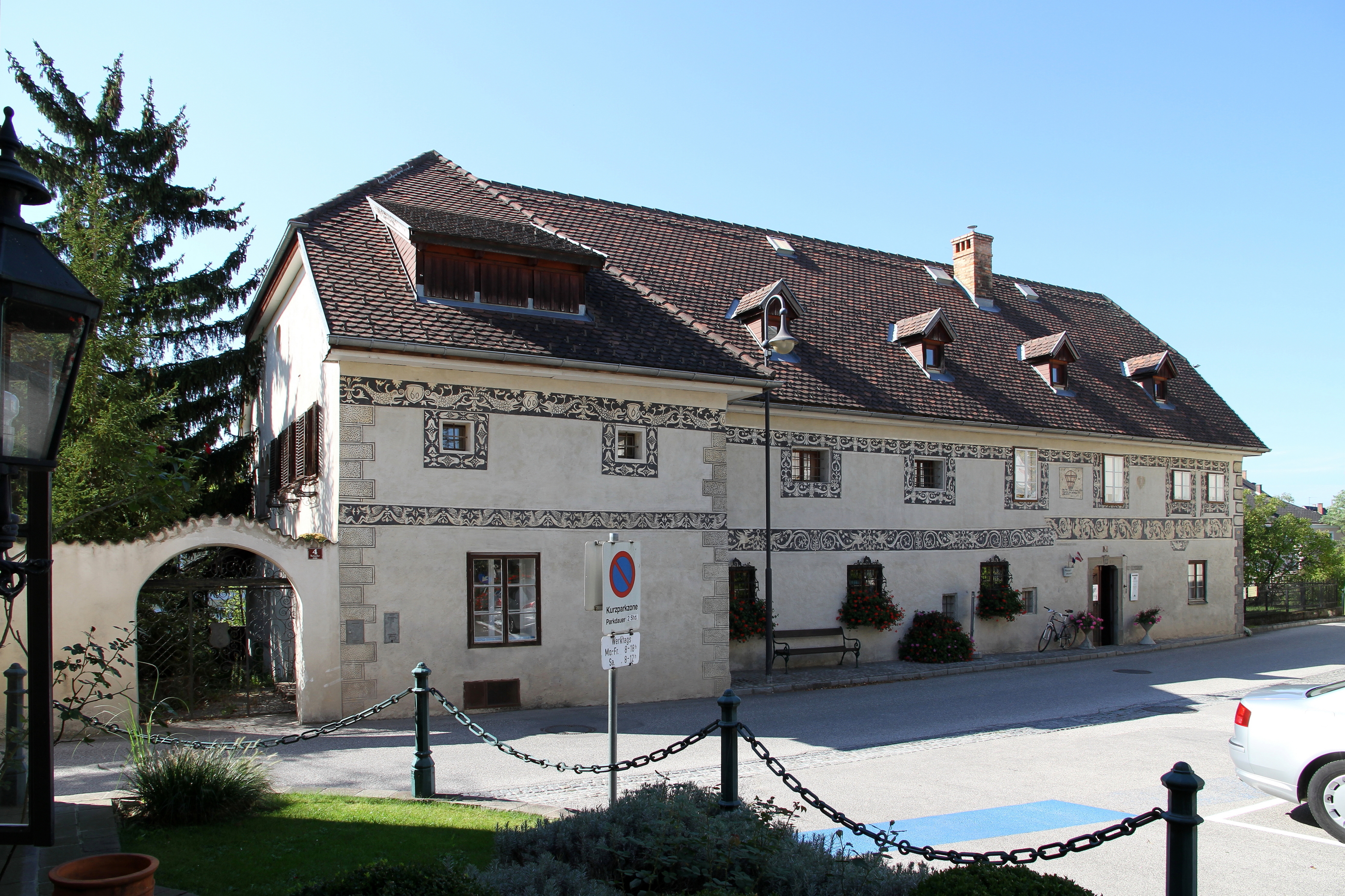 Das Heimatmuseum (seit 1968) der niederösterreichischen Marktgemeinde Purgstall. Das Haus mit Seitenrisalit und Sgraffitodekor wurde im 16./17. Jahrhundert errichtet.